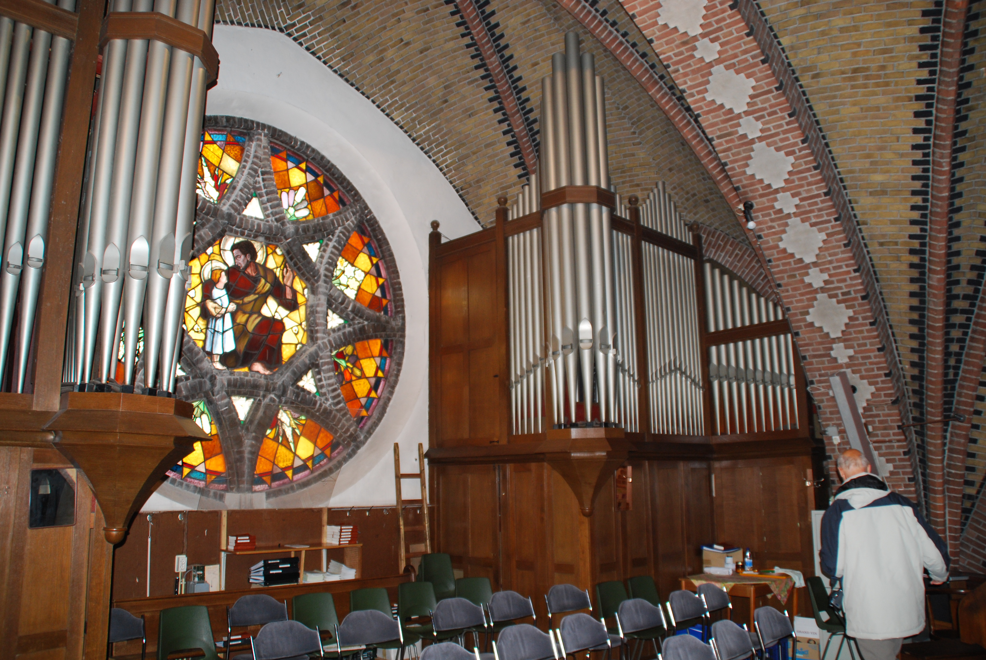 Jozefkerk - Hillegom, The Netherlands